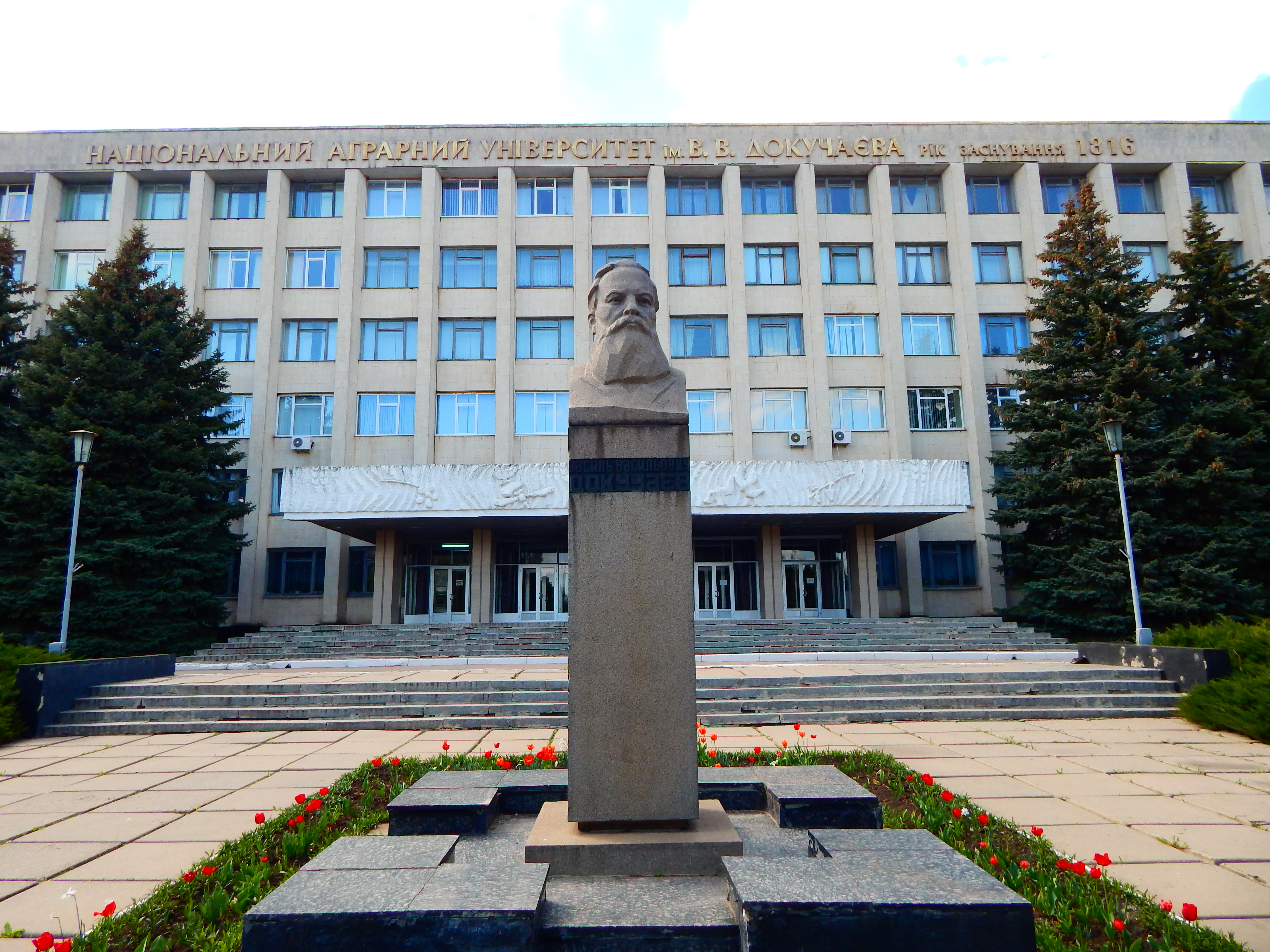 Пам'ятник В. В. Докучаєву – російському вченому., Докучаєвське (Комуніст), біля головного корпусу Харківського сільськогосподарського інституту ім. Докучаєва